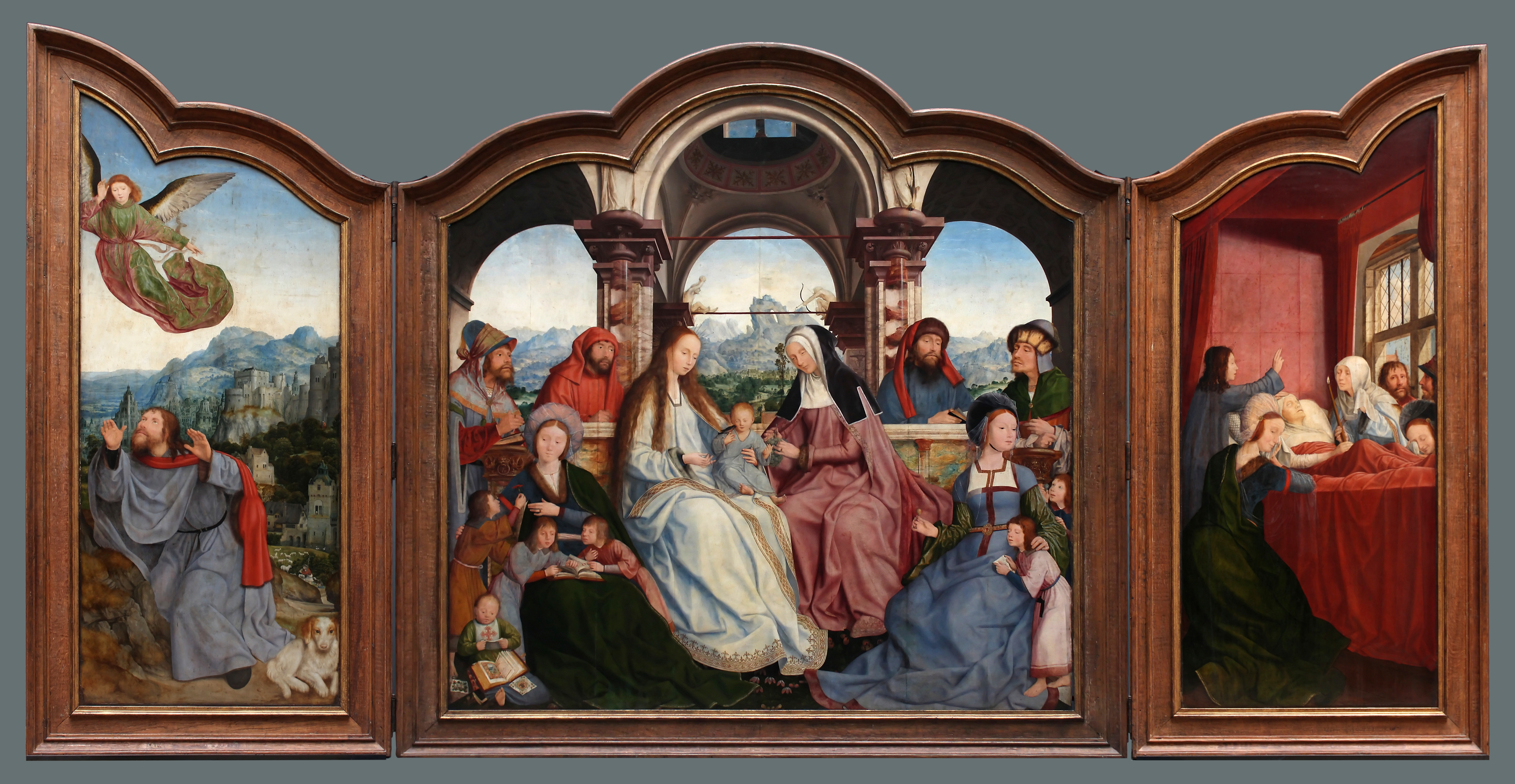 Panneau central : La famille de Sainte-AnneVolet gauche : L'ange prédit à Joachim la naissance de MarieVolet droit : La mort de Sainte-Anne.